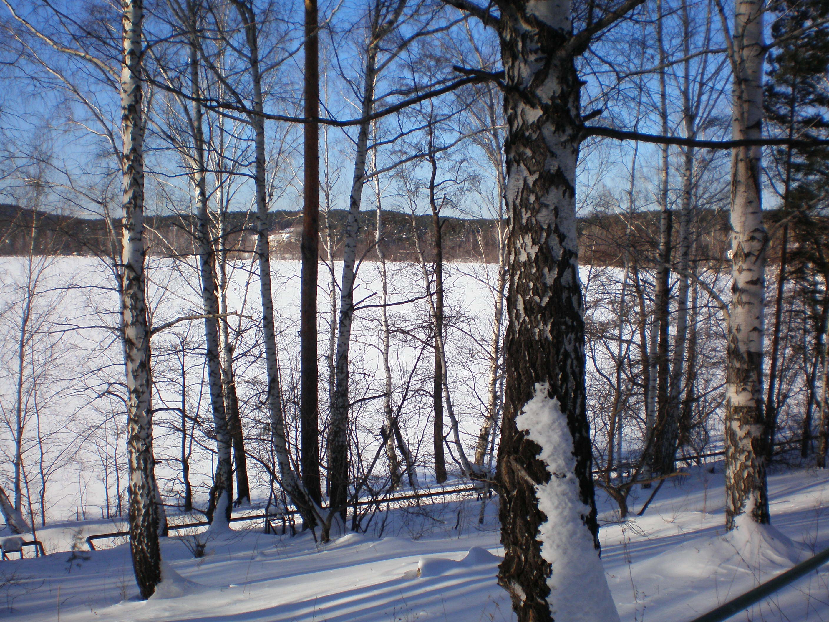 вид на оз. Теренкуль